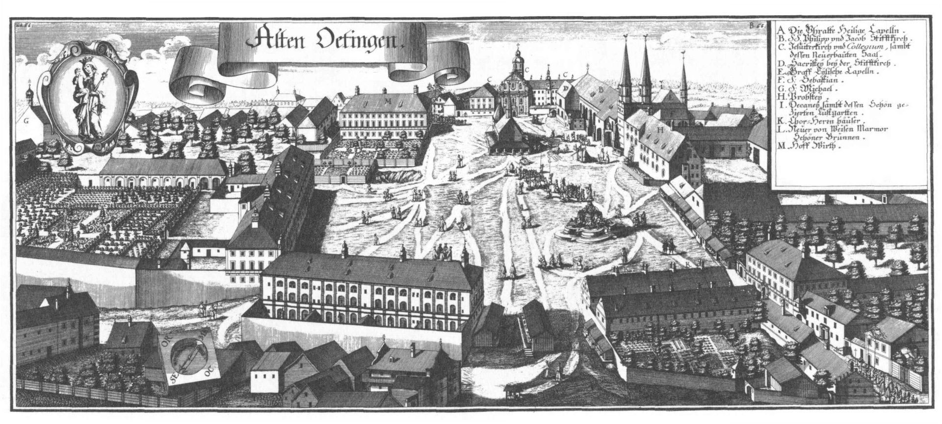 Anischt von Altötting nach einem einem Kupferstich von Michael Wening von (1721)